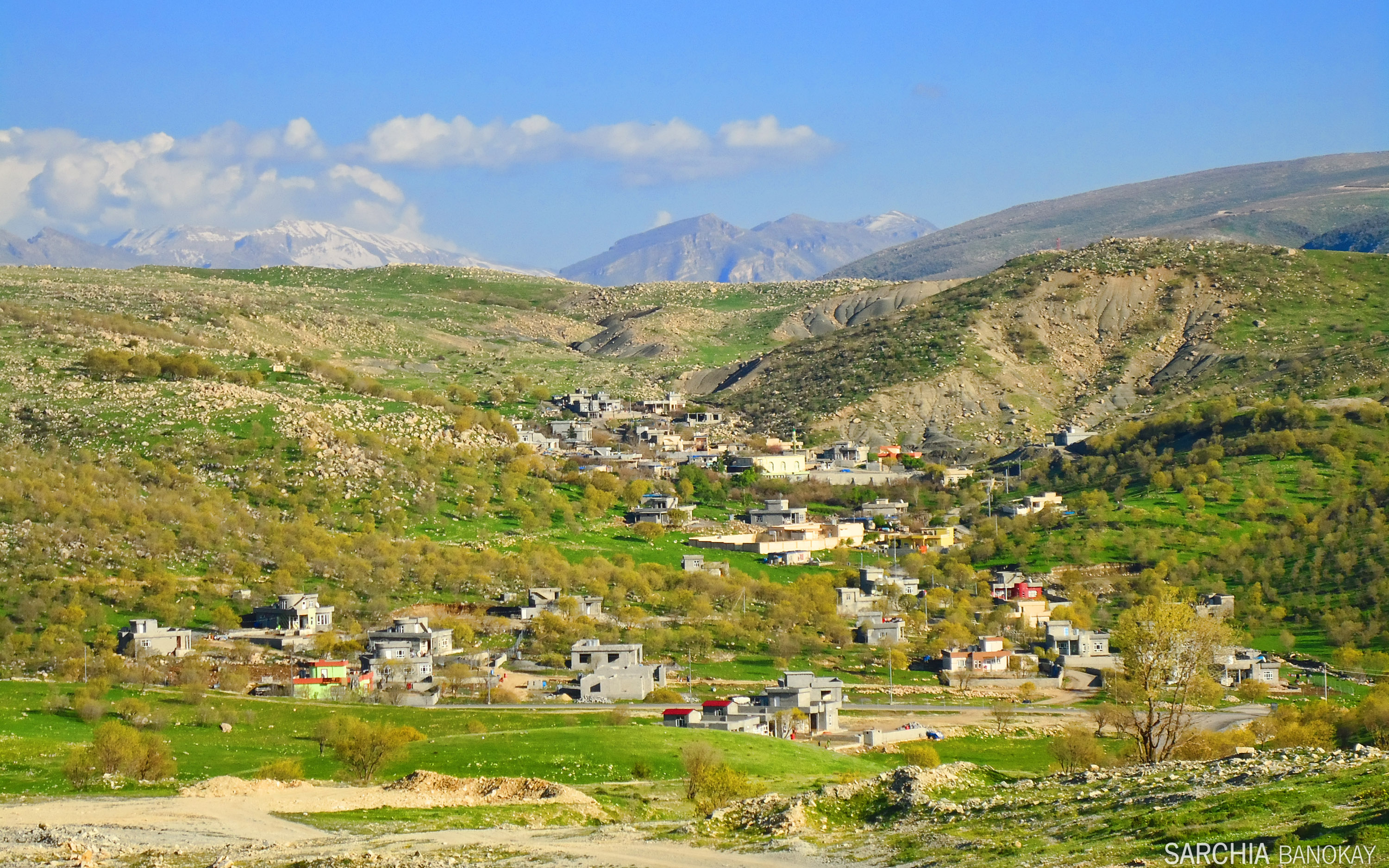 کوردیی ناوەندی: دیمەنێکی گوندی بەنۆکە، لە لە وەرزی بەھاردا